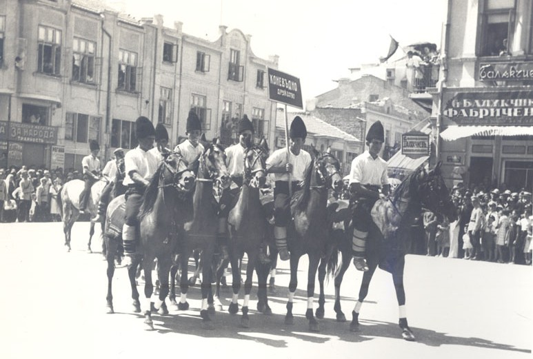 4-ти селскостопански културен и национален събор, 28 - 29 август 1938 г., гр. Варна. Парад на участниците в събора по ул. Княз Борис І. На преден план са представителите на Коневъдното дружество.